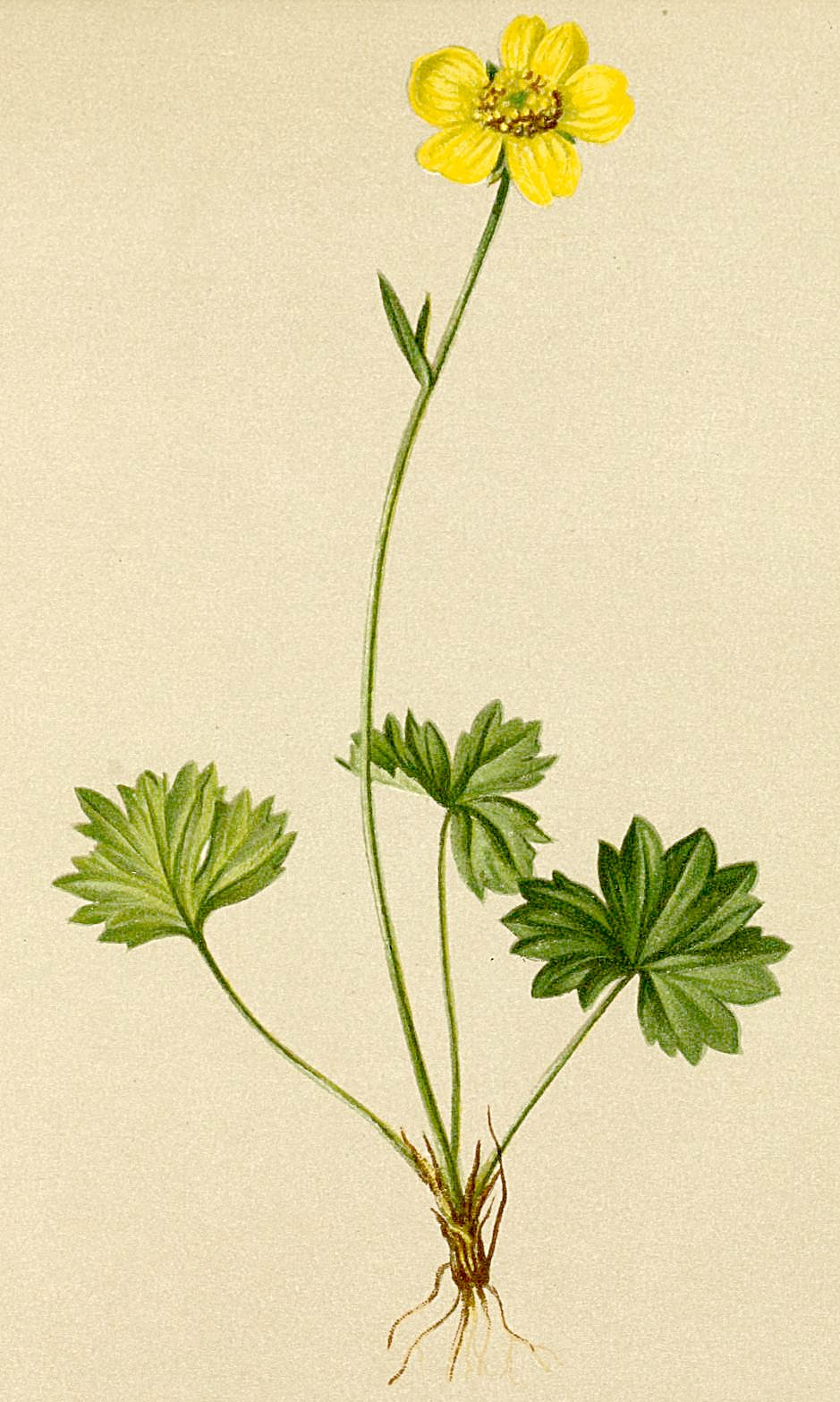 Ranunculus tuberosus (Ranunculus breyninus)